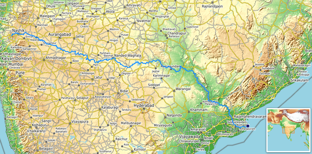 carte réalisée sur umap, [1] This map may be incomplete, and may contain errors. Don't rely solely on it for navigation.